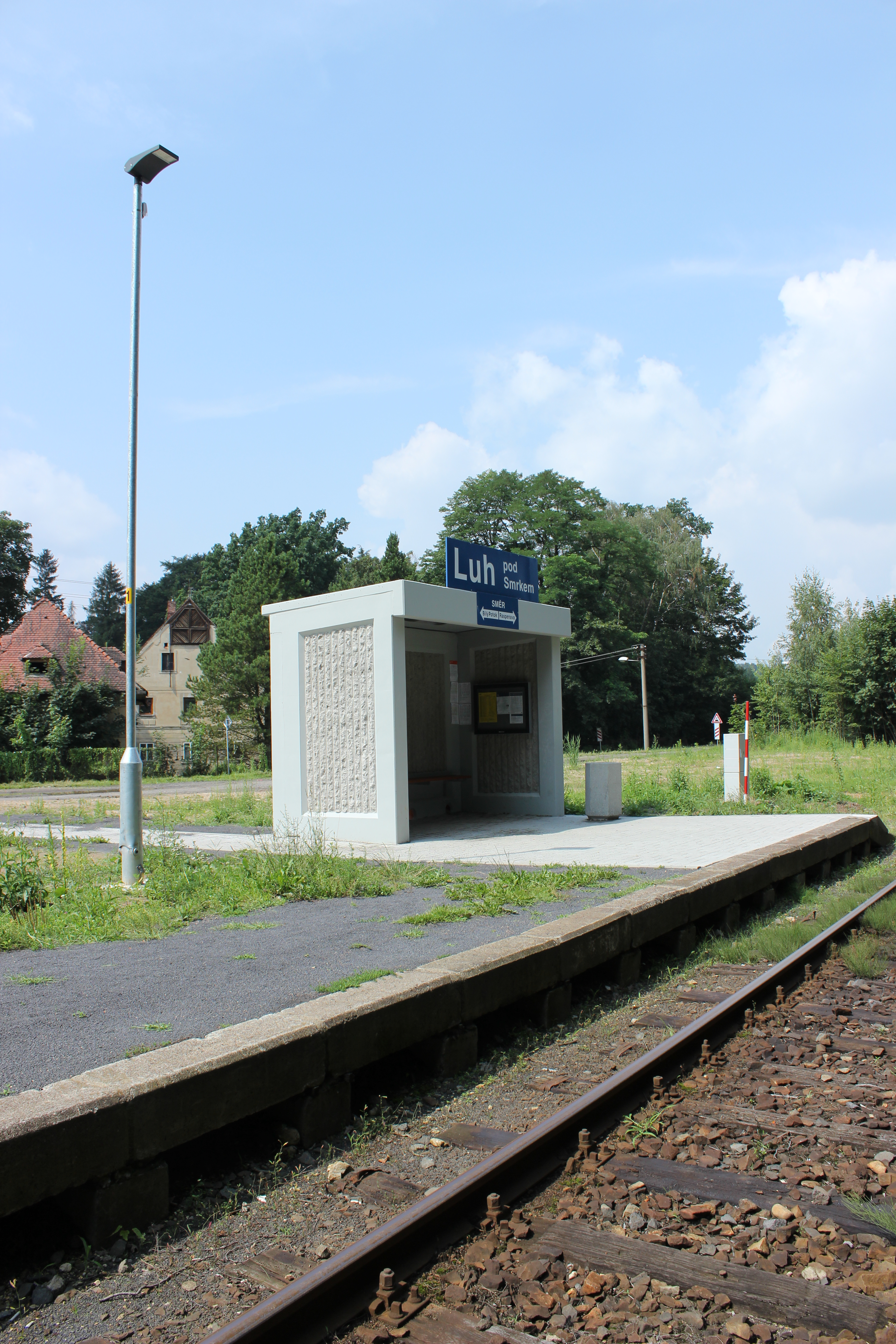 Čekárna na železniční zastávce Luh pod Smrkem.